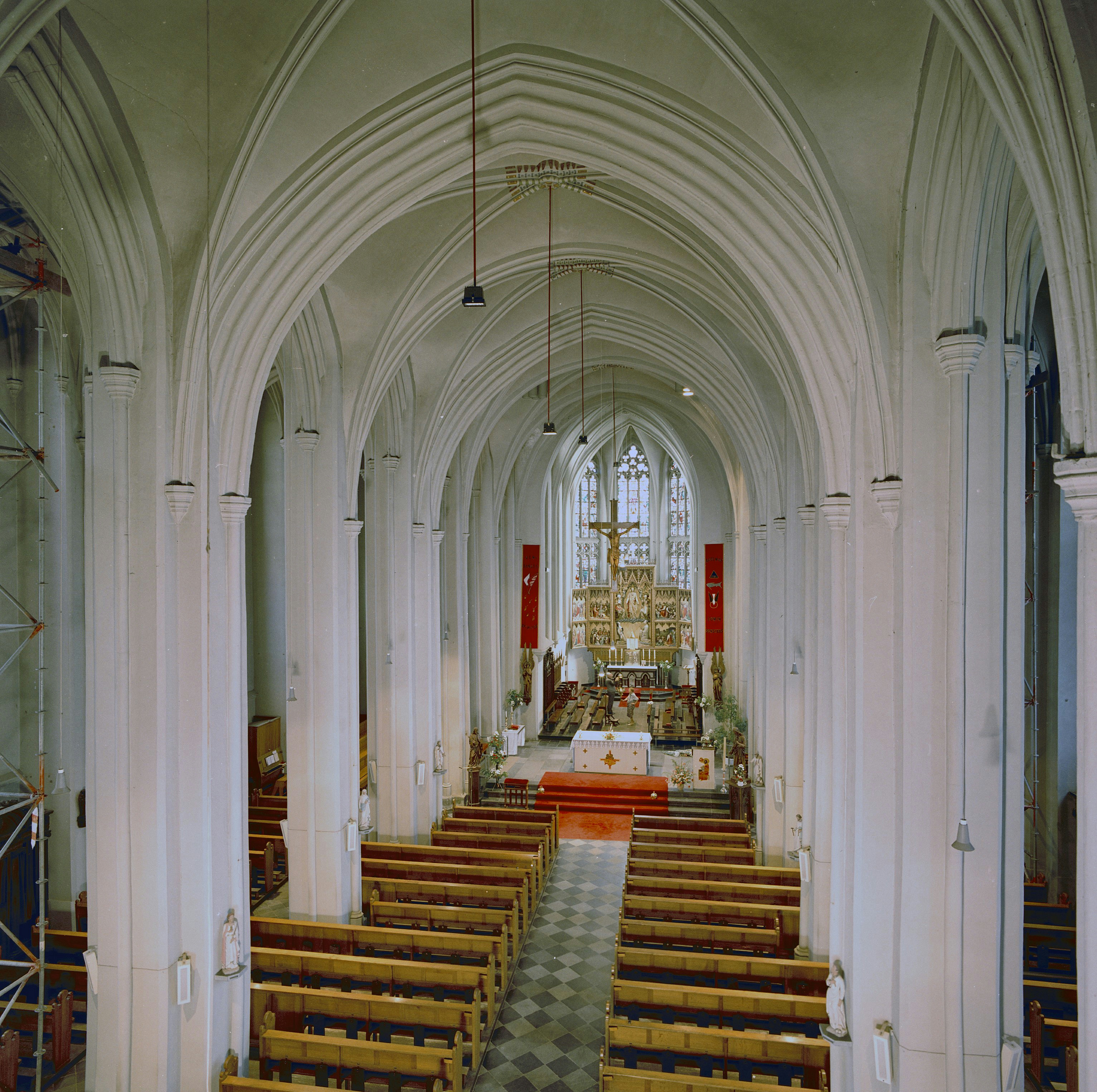 Sint Landricus: INTERIEUR, OVERZICHT NAAR HET OOSTEN